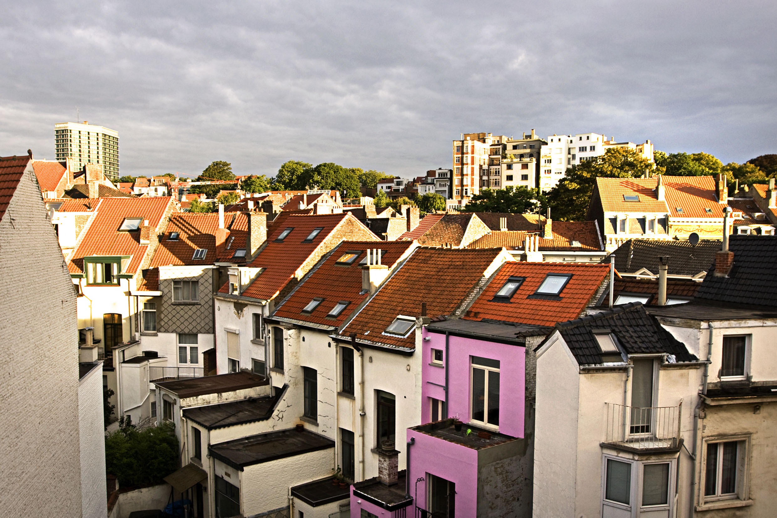 Roofs of Flagey, Brussels, Belgium